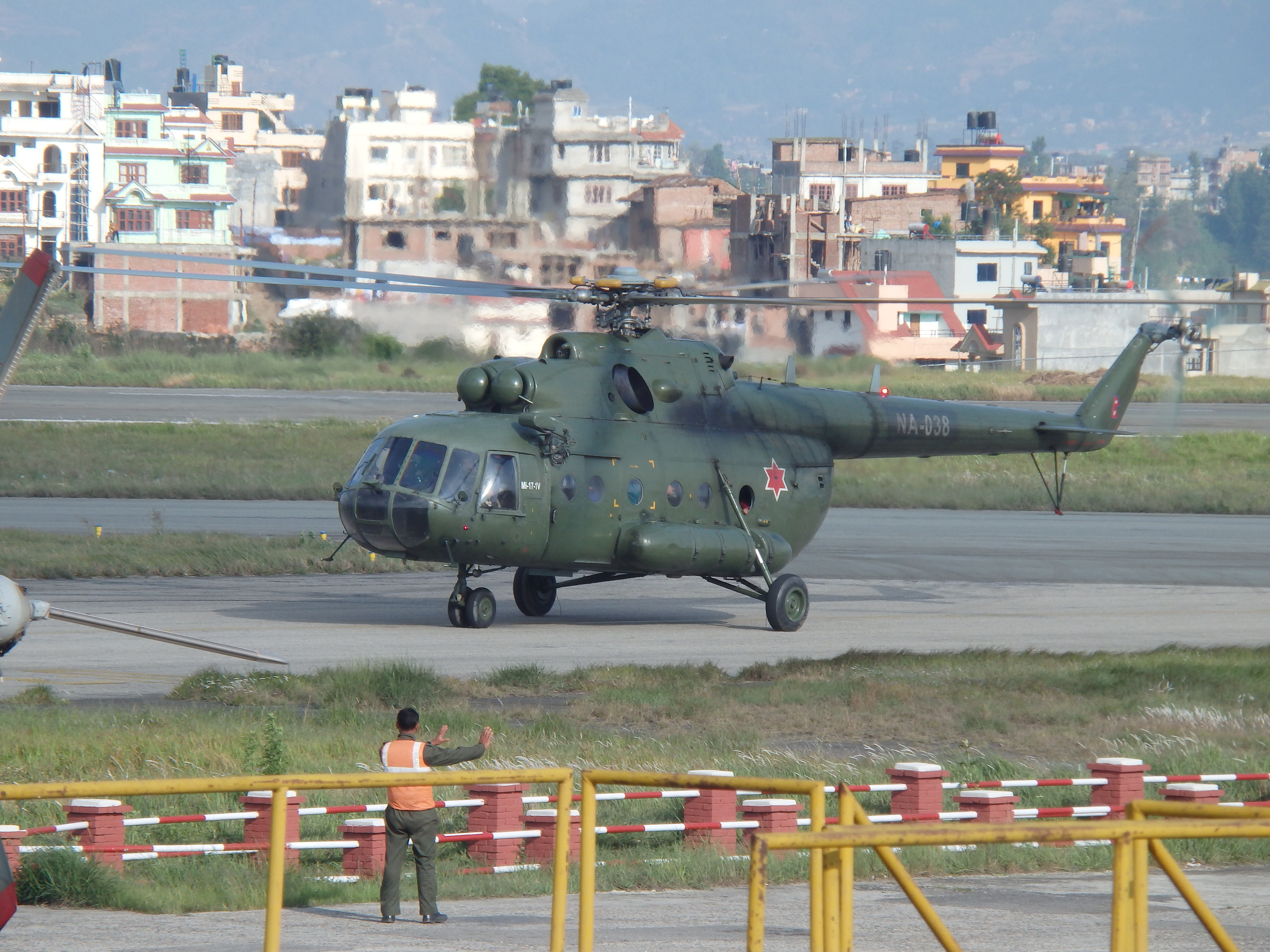 Mi-8 Nepal Army